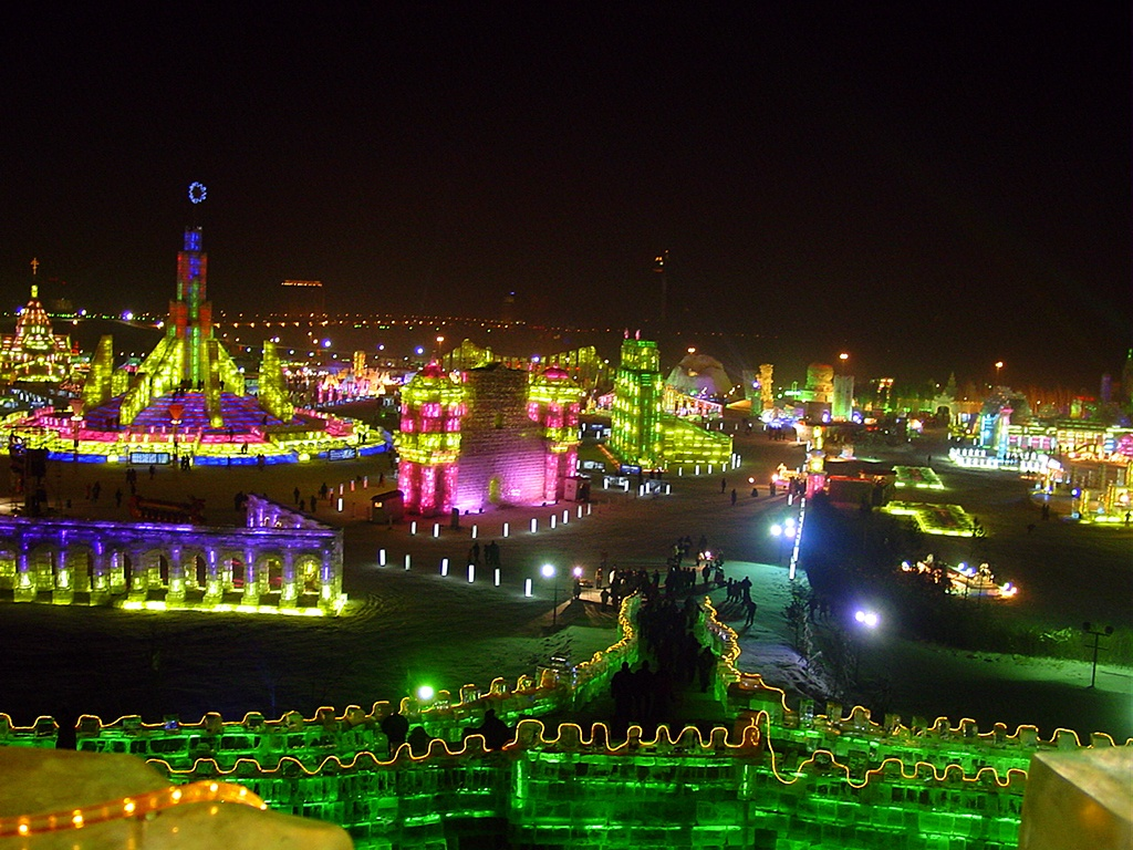 冰灯-1